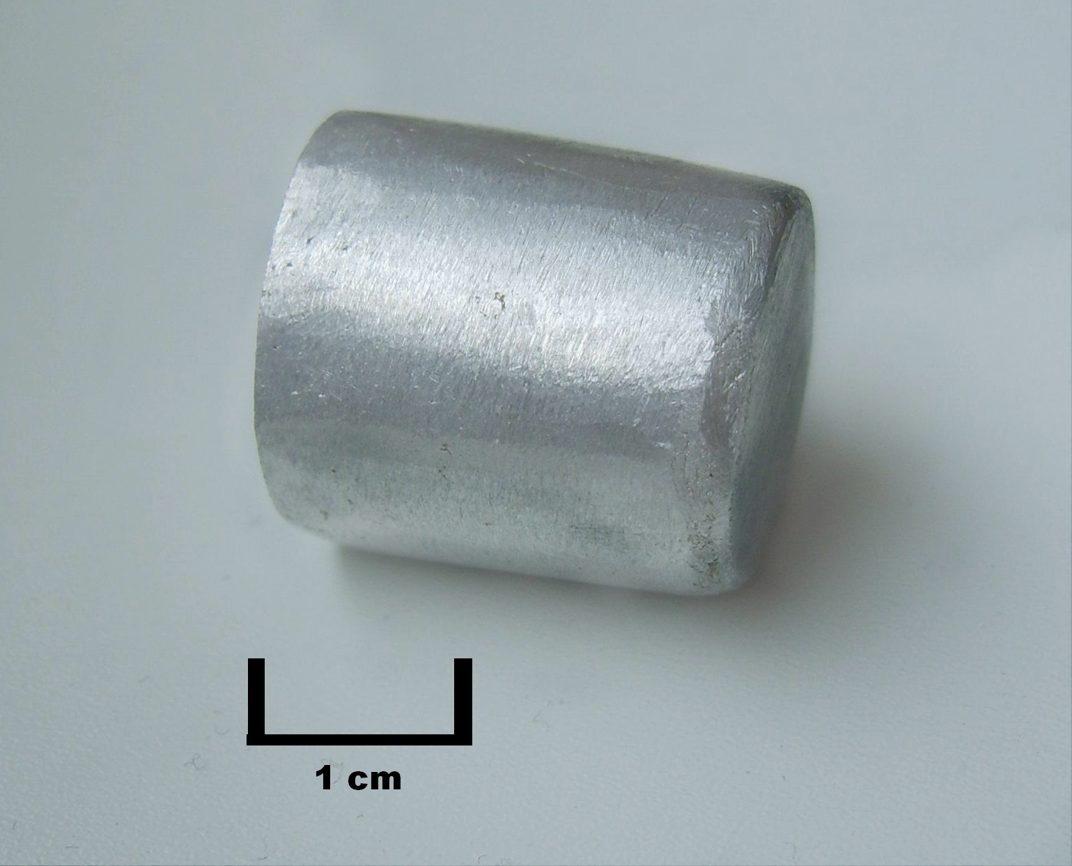 Чистый алюминий - серебристо белый металл.